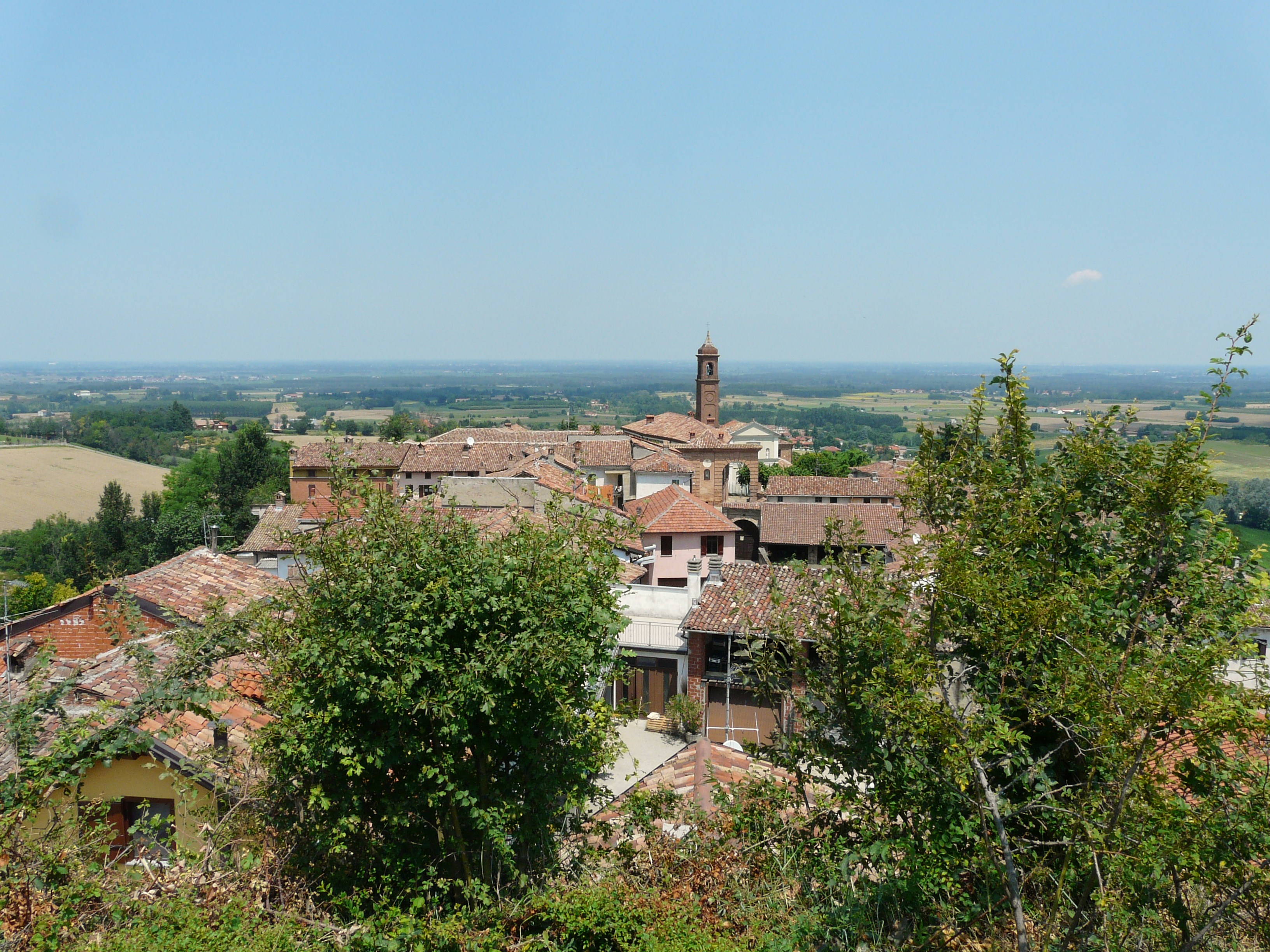 Panorama dai ruderi della torre di Pecetto di Valenza, Piemonte, Italia